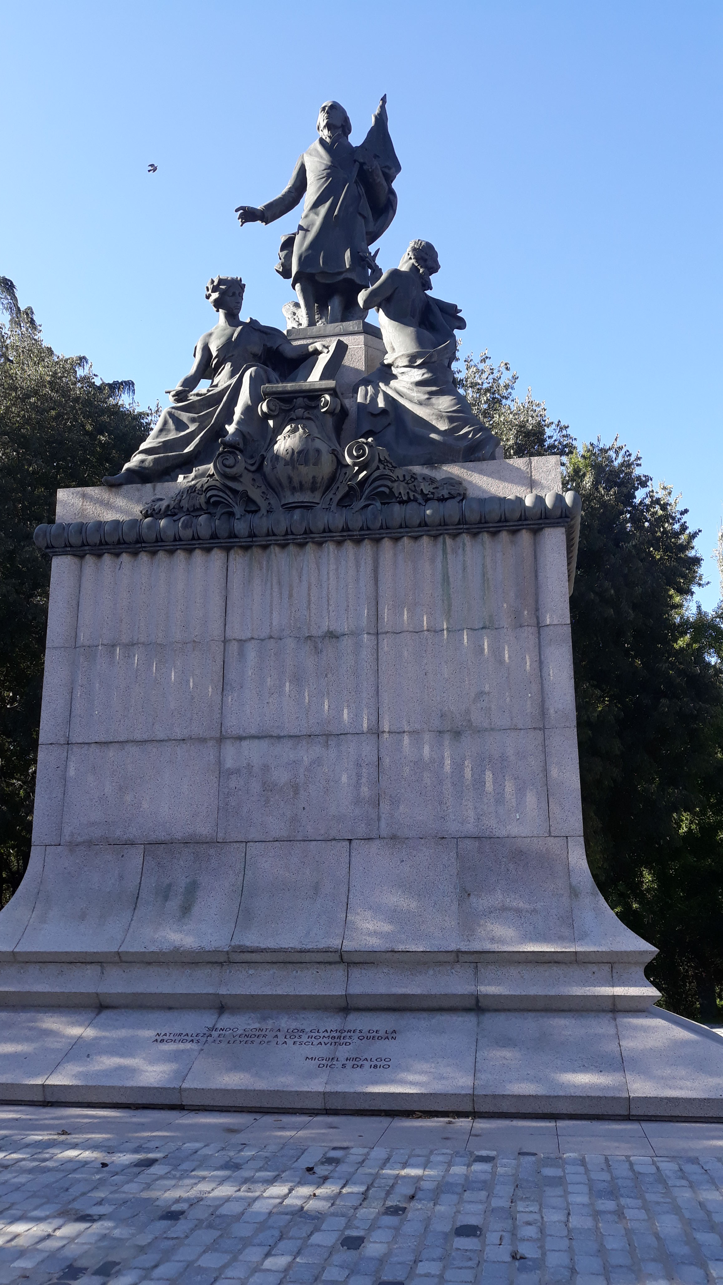 Das Denkmal des Vaters der mexikanischen Unabhängigkeitserklärung, Miguel de Hidalgo, Parque del Oeste in Madrid.